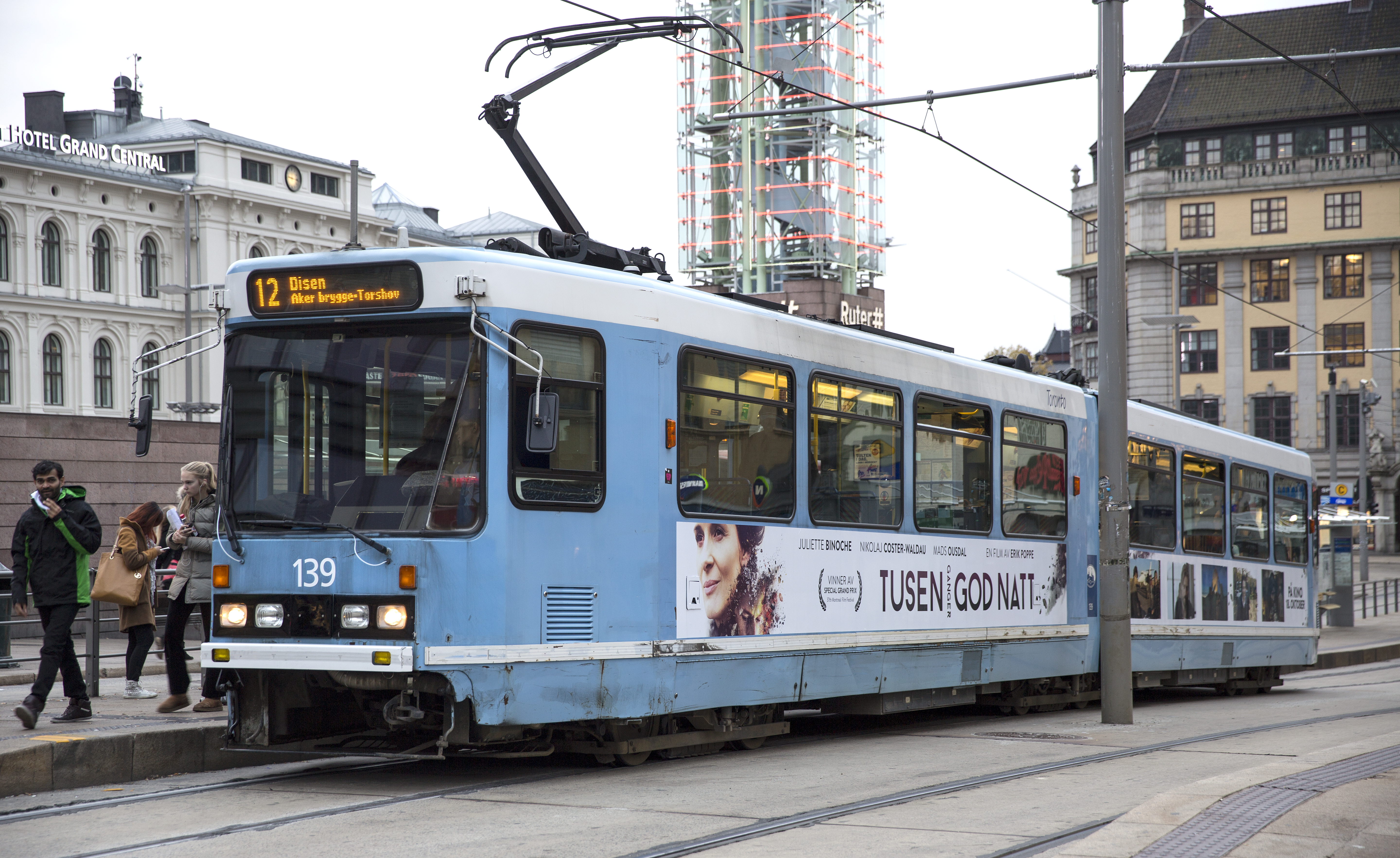 Spårvagn (trikken) vid Oslo Centralstation (Oslo Sentralstasjon), fotograferat 2013-10-17. Photo: News Øresund - Jenny Andersson © News Øresund(CC BY 3.0) Detta verk av News Øresund är licensierat under en Creative Commons Erkännande 3.0 Unported-licens (CC BY 3.0). Bilden får fritt publiceras under förutsättning att källa anges. The picture can be used freely under the prerequisite that the source is given. News Øresund, Malmö, Sweden. Øresund är en oberoende regional nyhetsbyrå som ingår i projektet Øresund Media Platform som drivs av Øresundsinstituttet i partnerskap med Lunds universitet och Roskilde Universitet och med delfinansiering från EU (Interreg IV A Öresund) och 14 regionala; icke kommersiella aktörer.